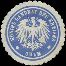 Sealing stamp Title: K. Landrat des Kreises Kulm Description: Culm, blau, weiß, geprägt Place: Kulm size: 4 cm